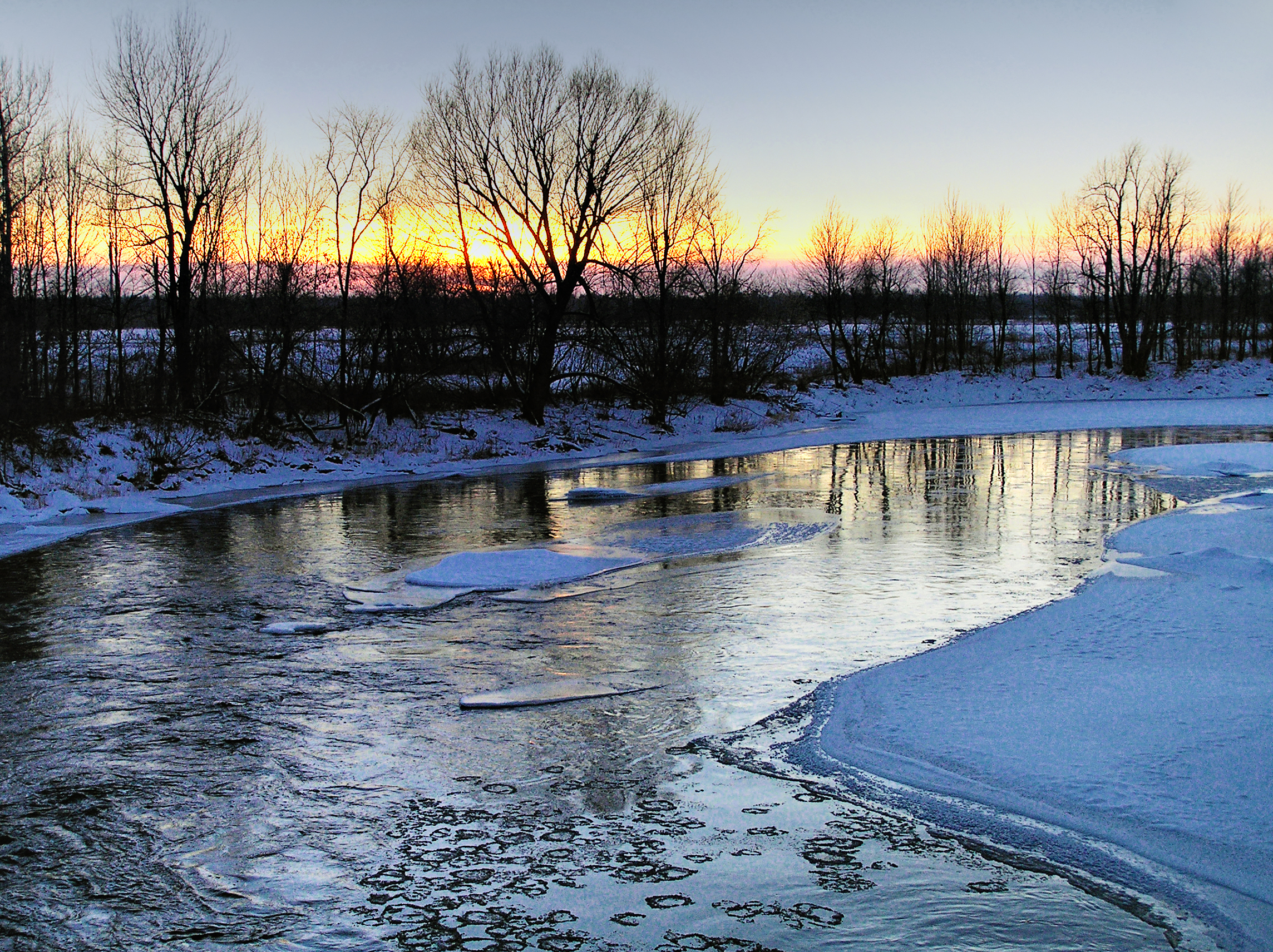 Brigham (Québec) - La rivière Yamaska en amont du pont couvert Balthazar (Déc-2005)